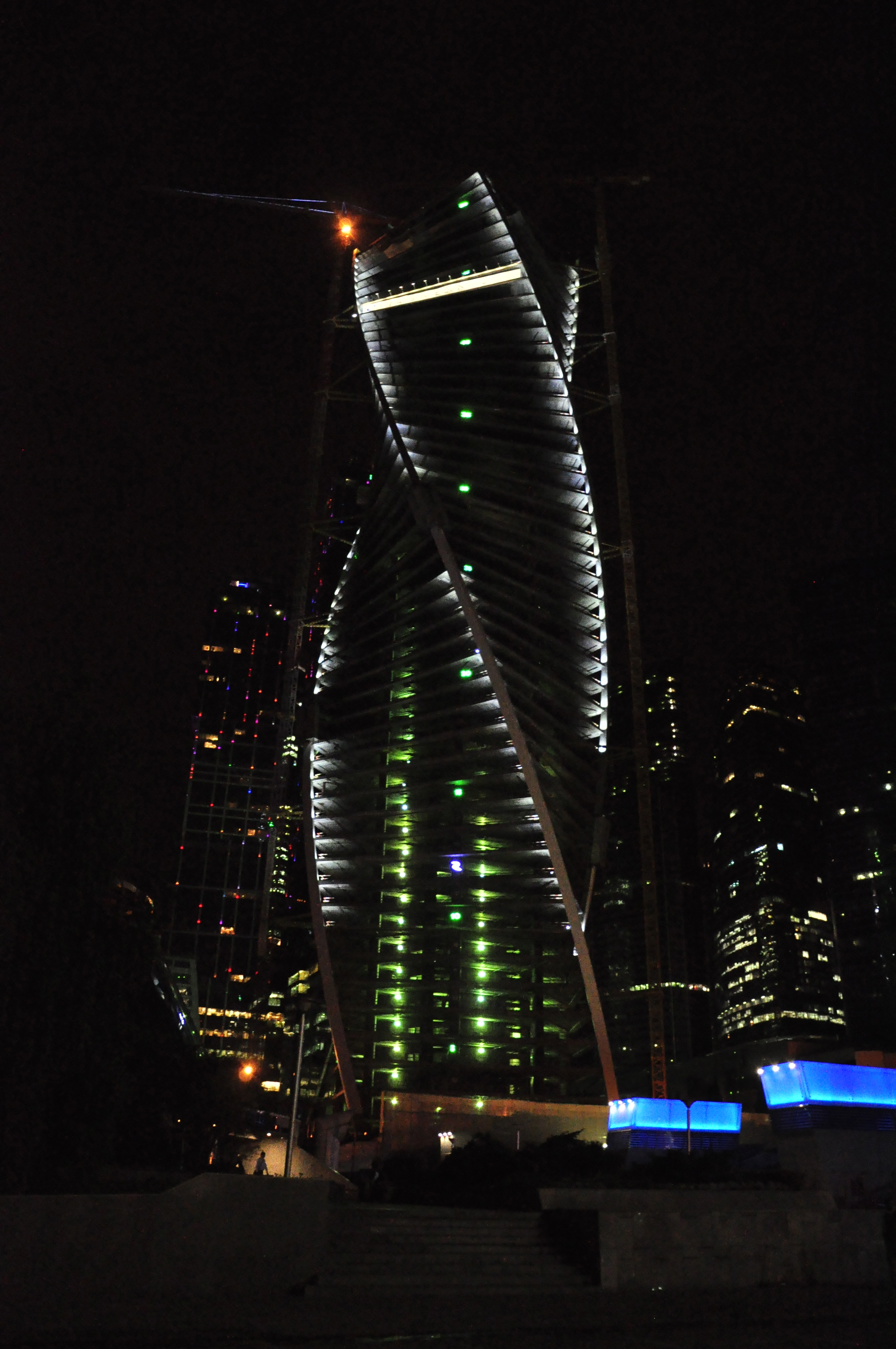 строился 52-й этаж